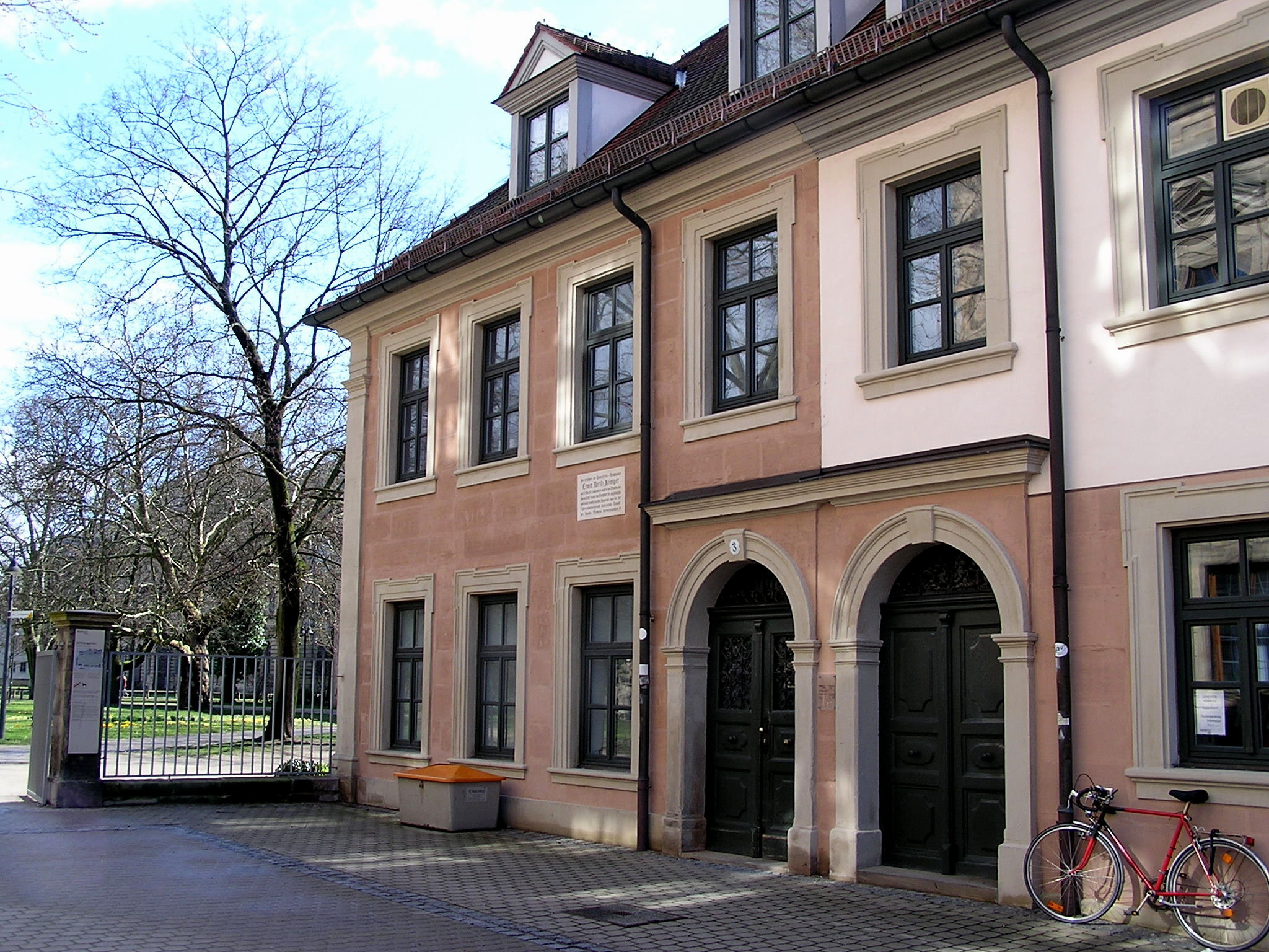 Reiniger Haus